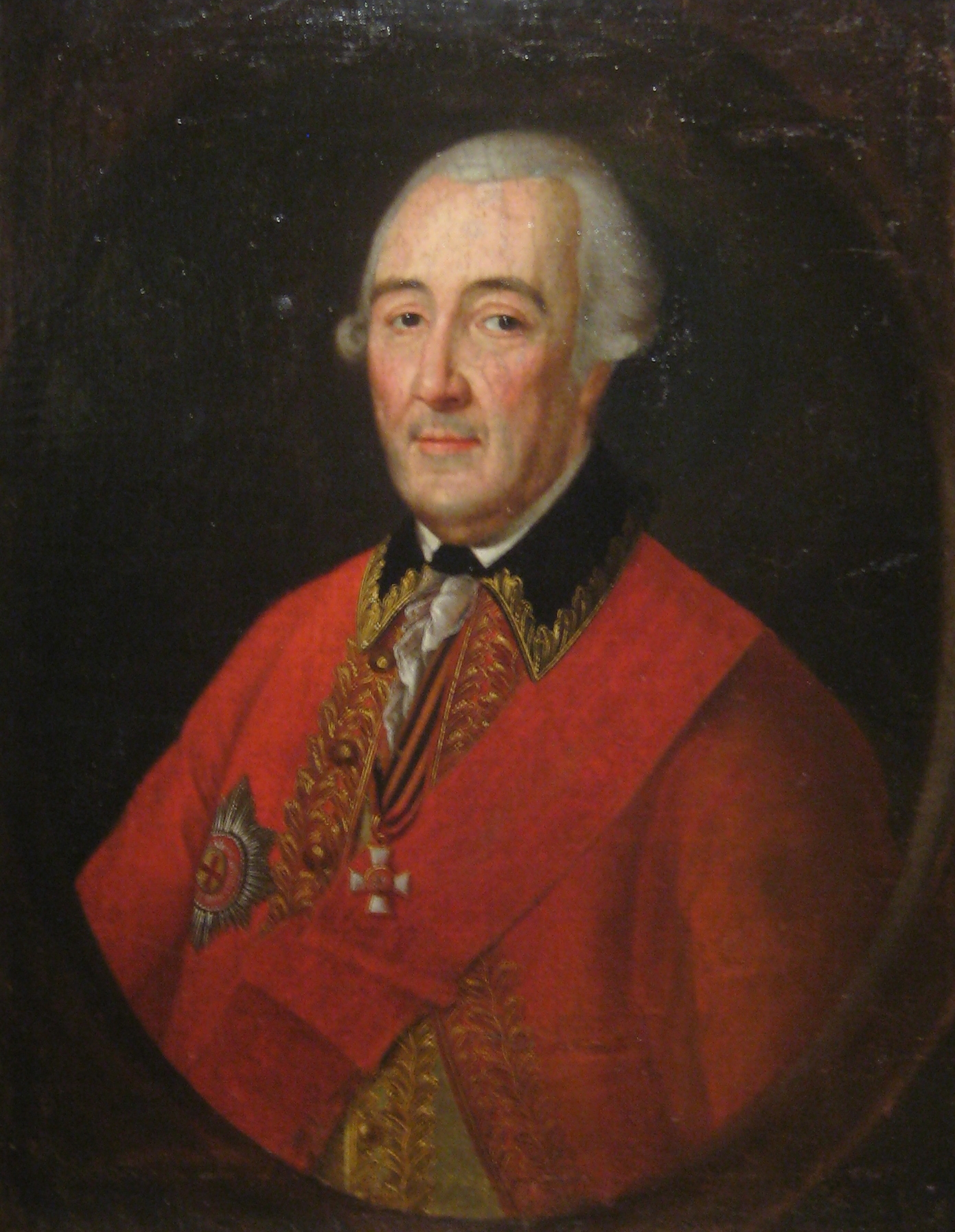 Портрет Мелиссино П.И. (?) Курская галерея